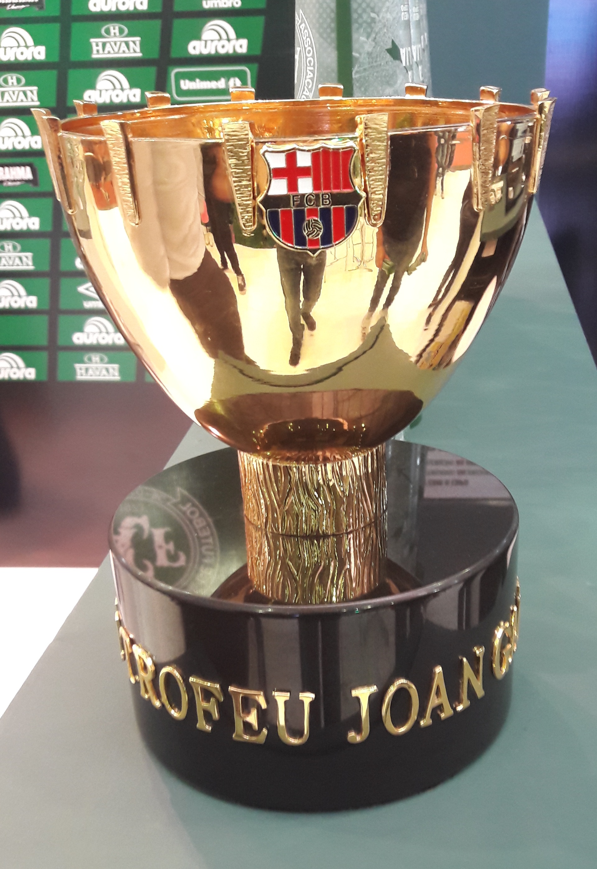 Troféu de vice-campeão do torneio Joan Gamper entregue para a Chapecoense.